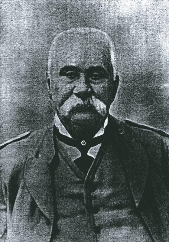 Photo d'Achille Fazzari